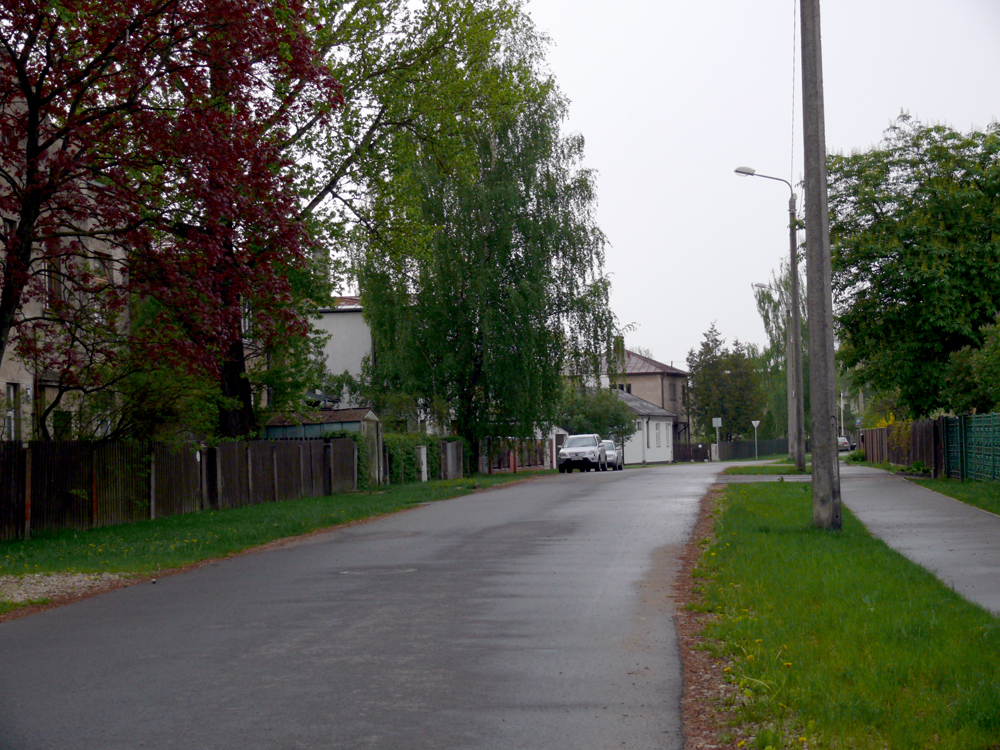 Stūrīša iela Teikā. 15.05.2010. Fotogrāfējis A.Buks.